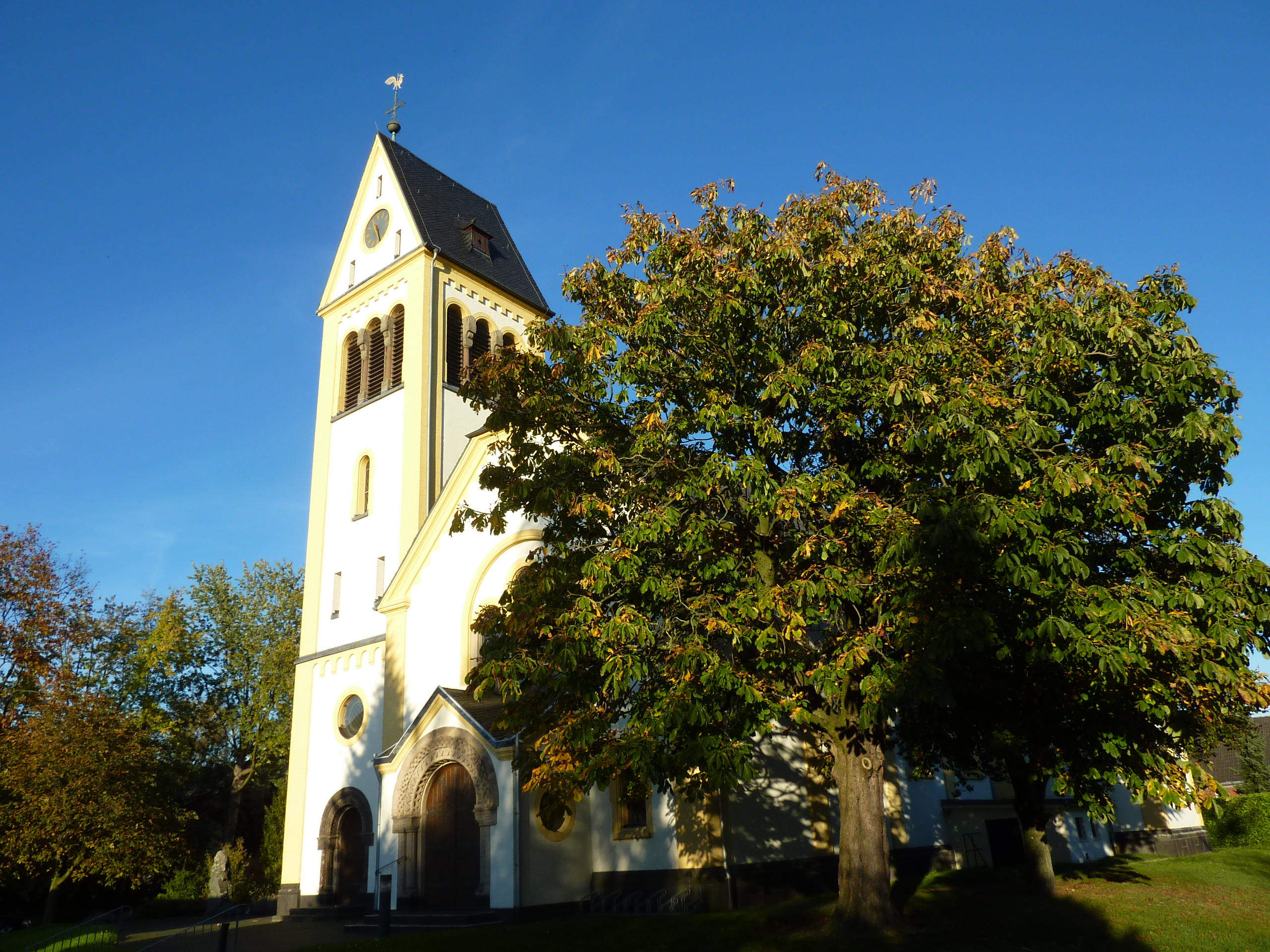 Katholische Kirche St. Martin Meerbusch Langst-Kierst